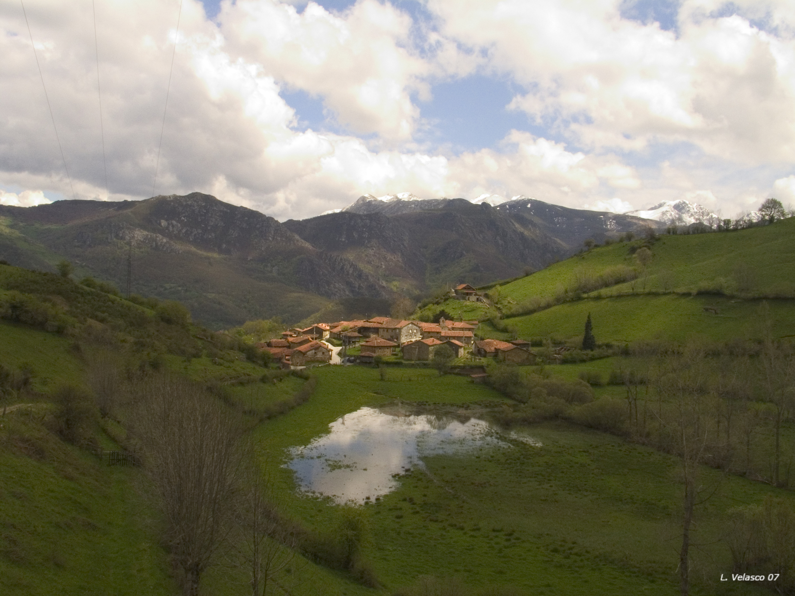 Vista del pueblo de La Focella Teverga Asturias, primavera de 2007.